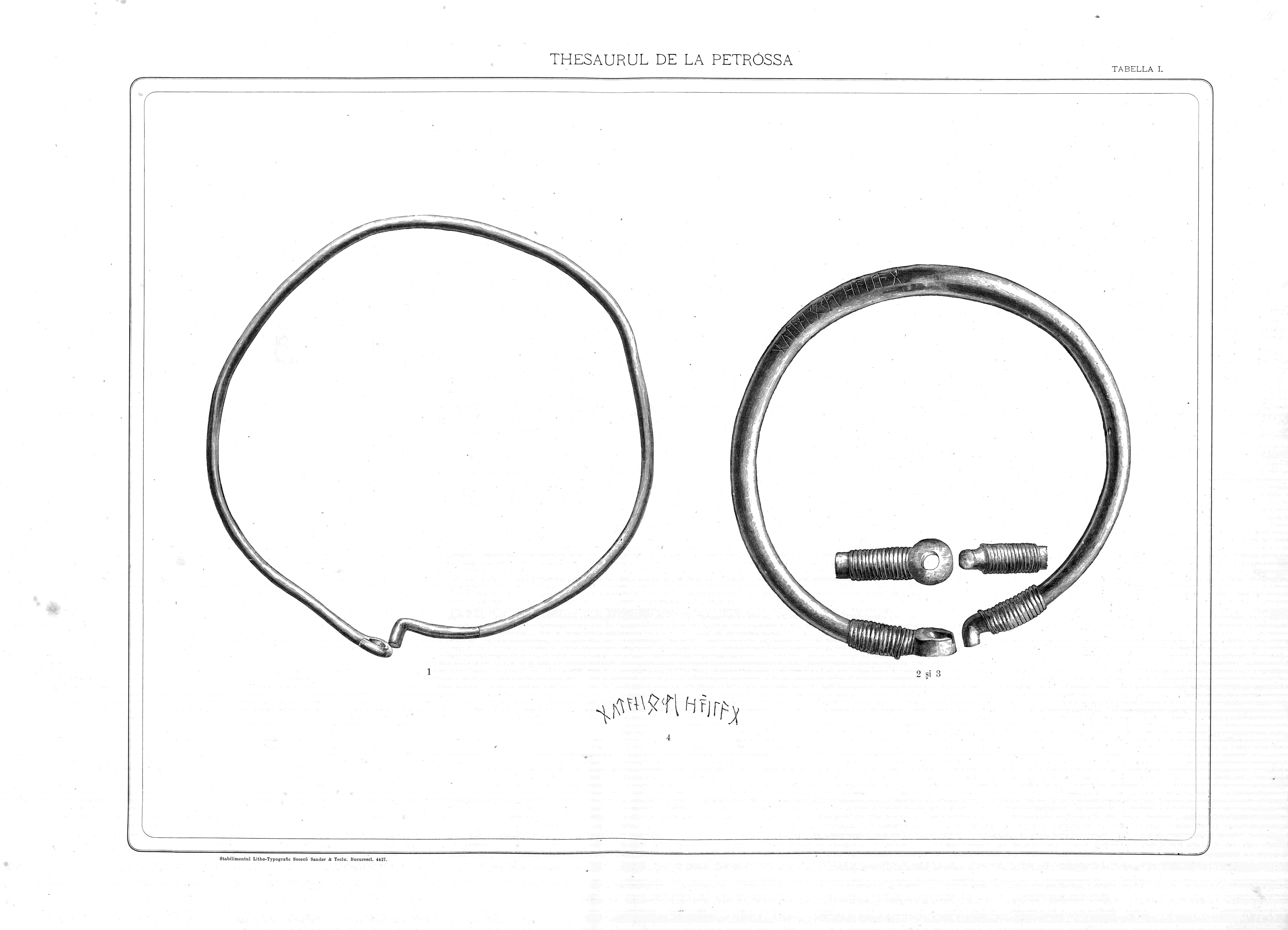 Veriga simplă (armilia sau torques) si Veriga cu inscripțiune. Aceasta din urmă este una din cele mai însemnate bucăți al comoarei, fiindcă este singura care are o însemnare săpată. Din nenorocire literele sunt cam șterse și nu se pot descifra lesne. La început s'a propus a se citi cuvintele grecești ya:ps — fii vesel și. bea — mai în urmă însă s'a constatat că caracterele înscripțiunei sunt caractere runice (vechi germane) și Odobescu propune a se citI astfel: Guthani oczvi hailag, ceea ce s'ar traduce prin • Lui Odin -- Sciția (sau patria) consacrată.